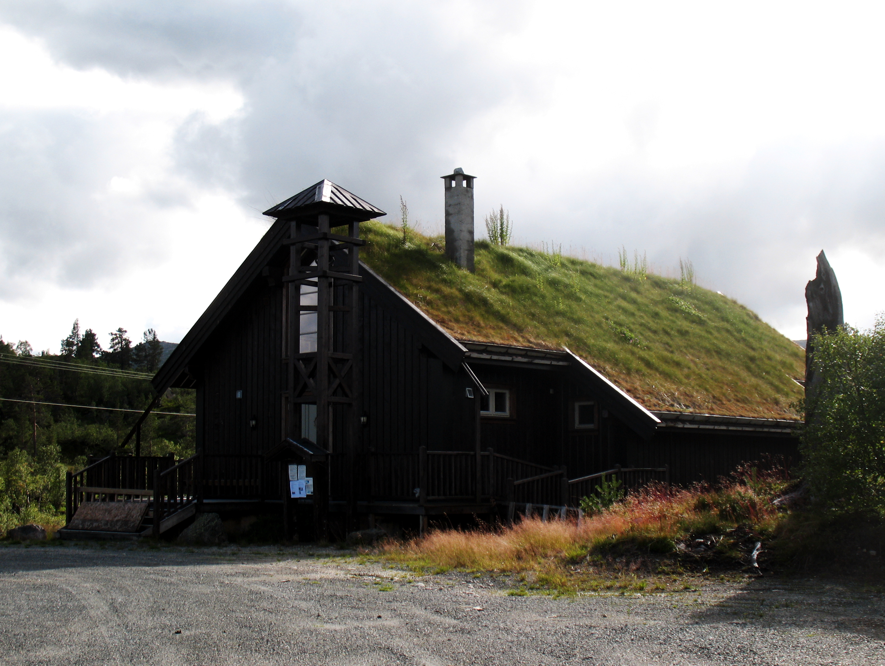 Skafsåheii fjellkyrkje i Hallbjønnsekken ved FV45 mellom Holtebru og Rotemo, Tokke kommune i Telemark. Vigsla 21. juni 2009. Artikkel i Vest-Telemark Blad.